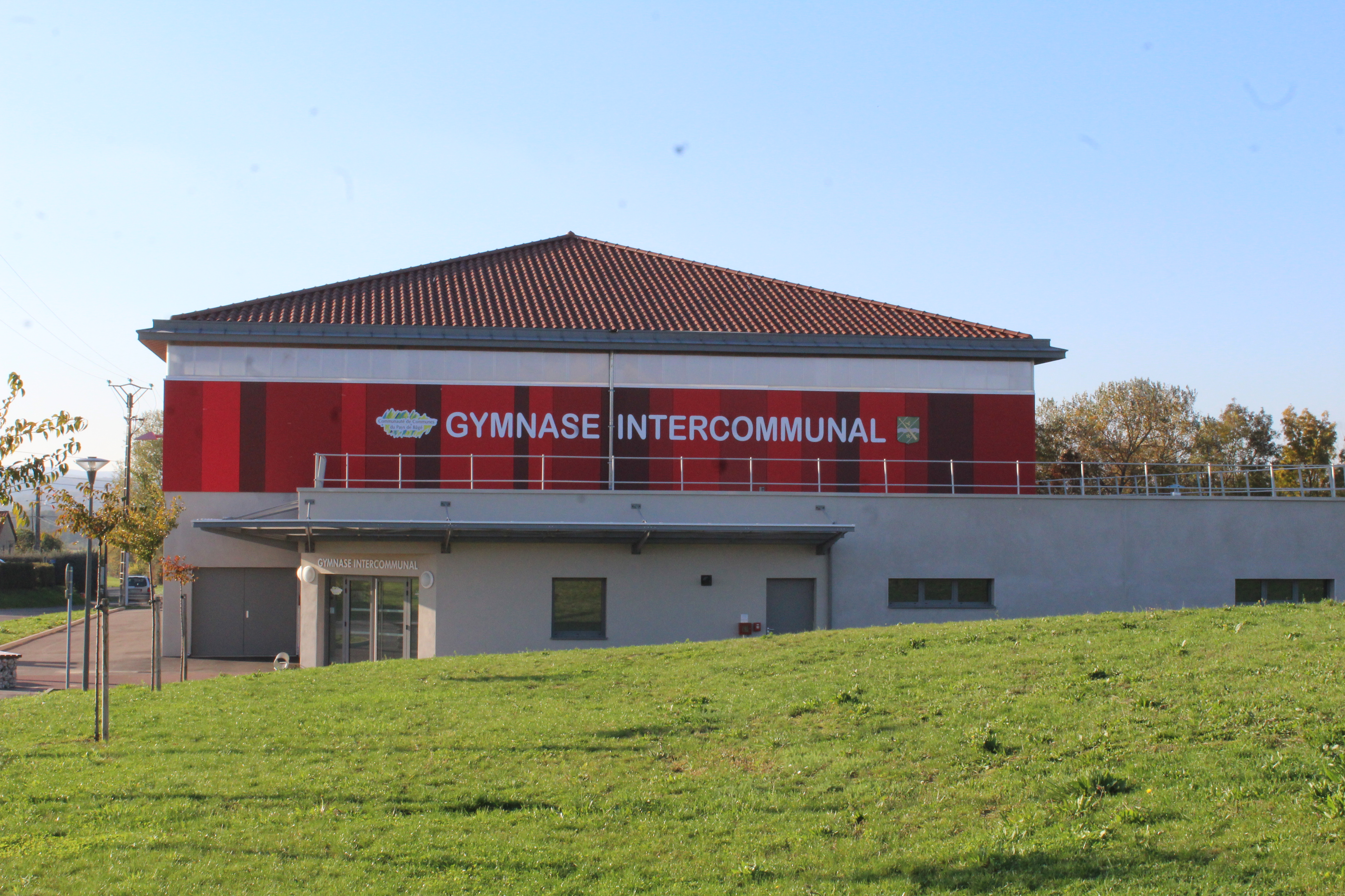 Gymnase intercommunal basé à Manziat.